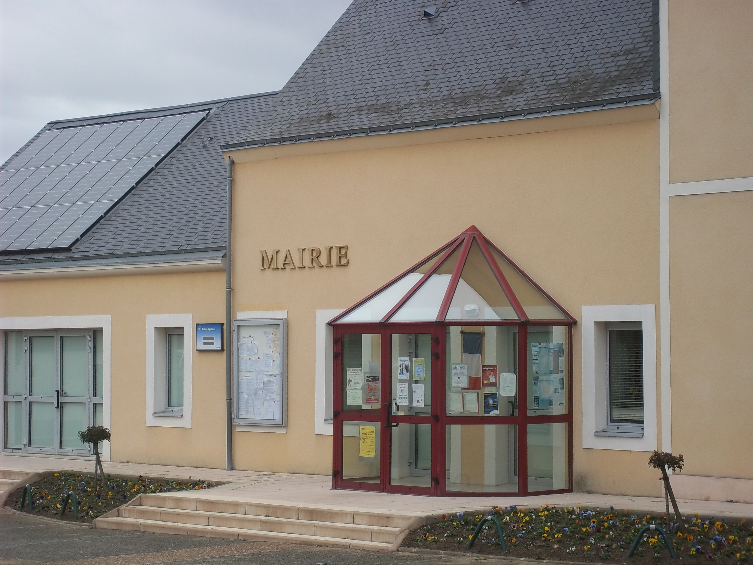 La Mairie de la commune de Brette les Pins